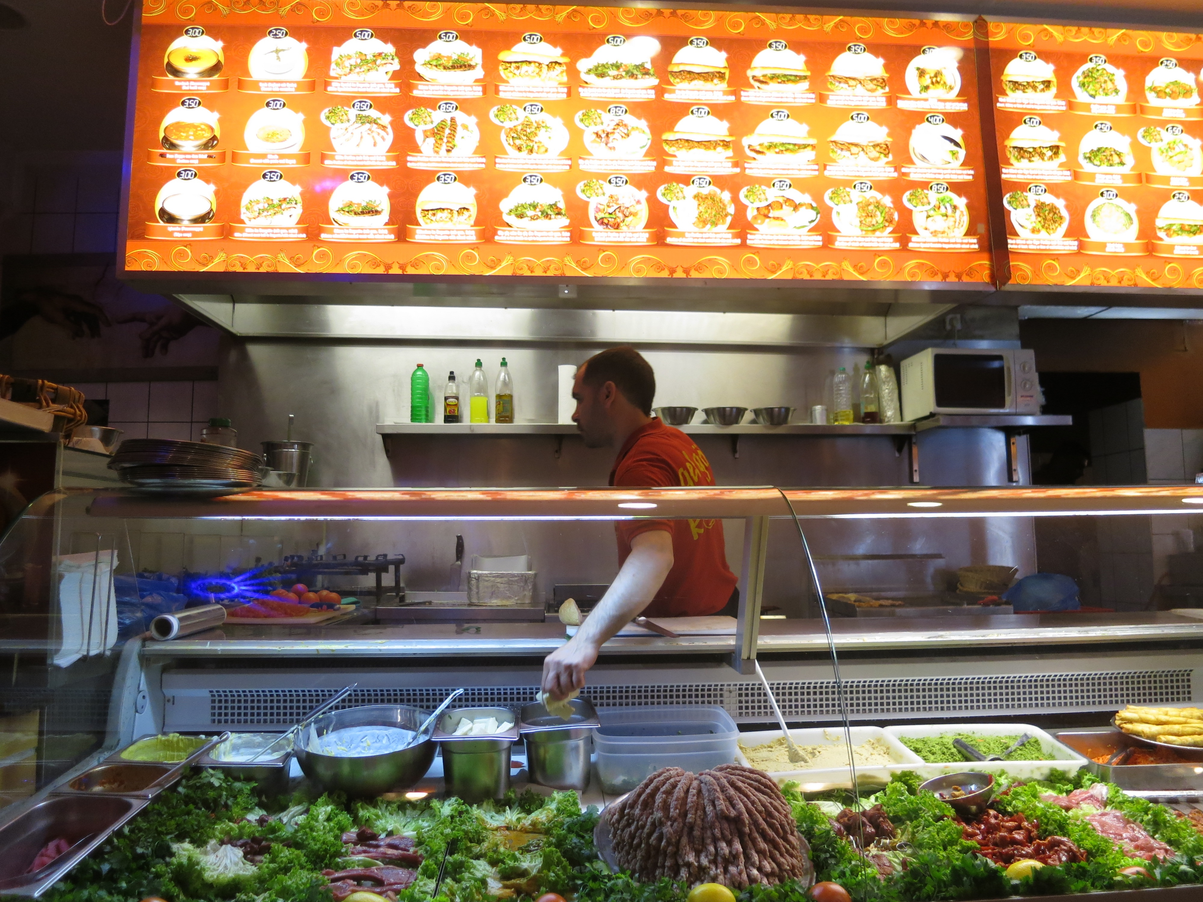 Döner Imbiss in Berlin, Deutschland